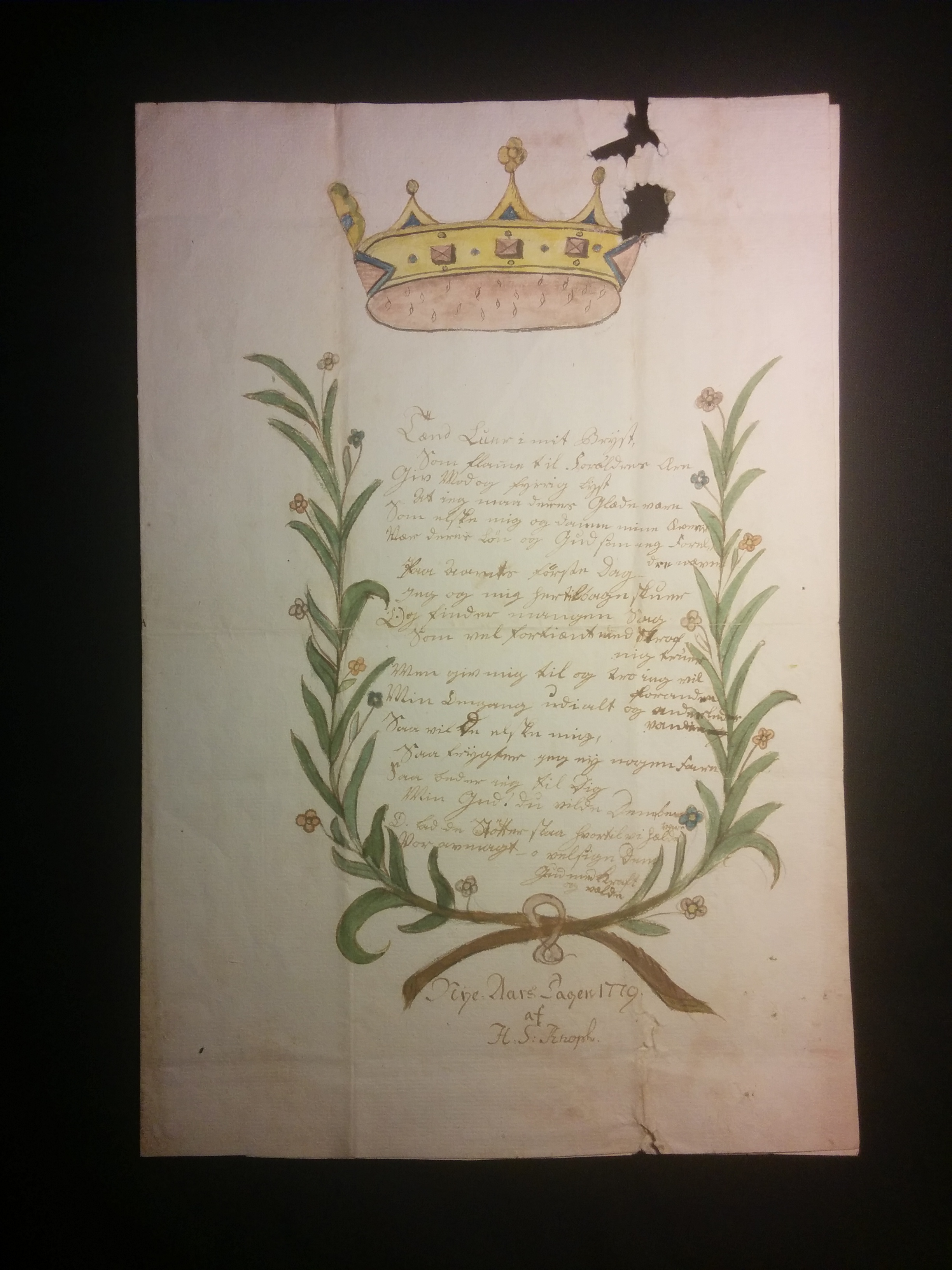 Knoph, Hans Schierven, og hustru: Nytårsdigt 1779 af sønnen H.S. Knoph. (1779-1779) 39: m.m. Billedet viser et nytårsdigt, hjemmetegnet og koloreret. Det var ikke ualmindeligt med denne type "nytårskort", man kunne også købe kort, man selv kunne kolorere og klistre vers ind i.